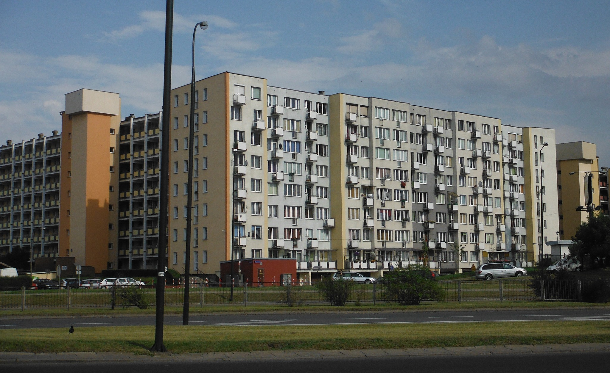 Osiedle Hansenów (tzw. Pekin) na Przyczółku Grochowskim w Warszawie.